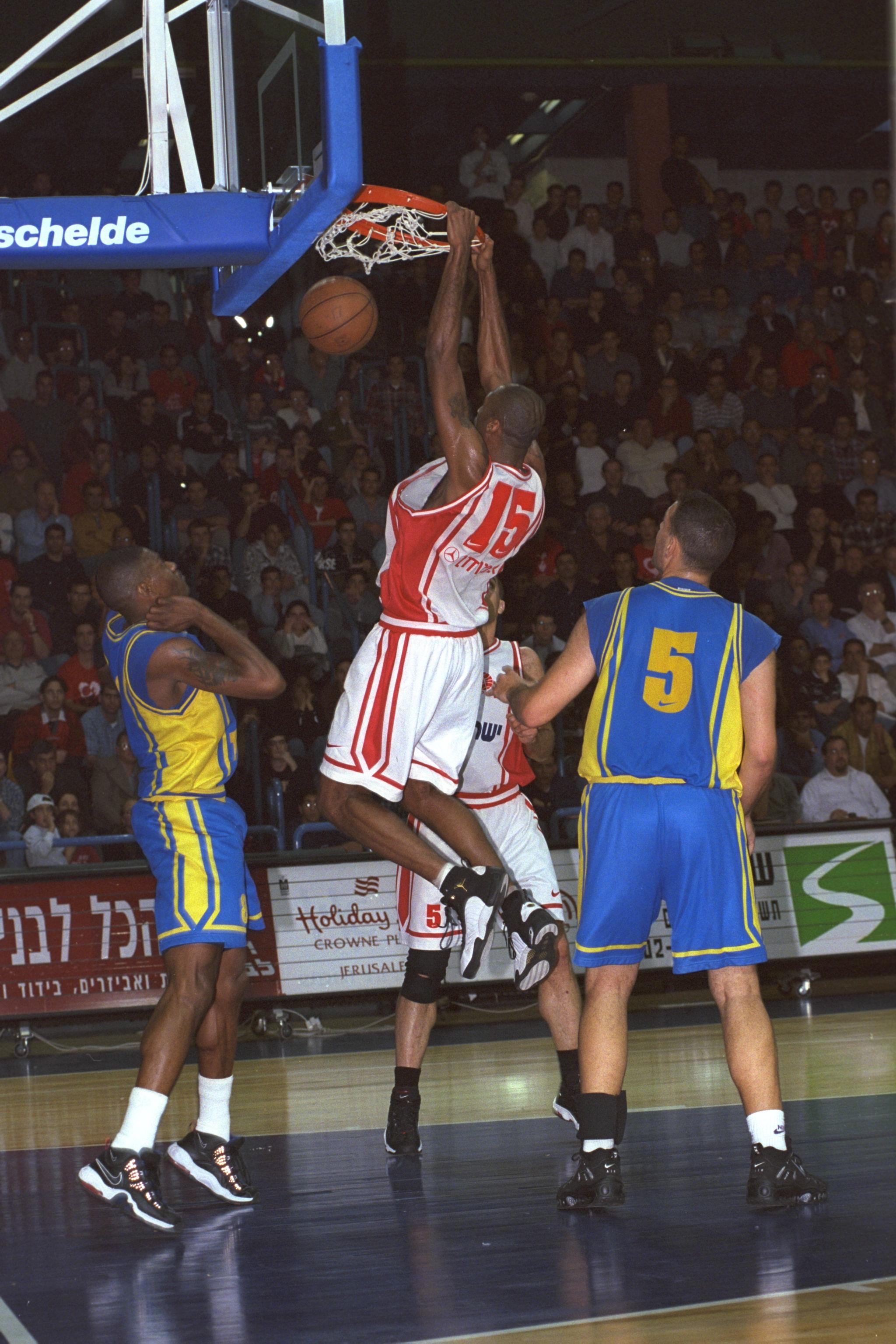 A Hapoel Jerusalem player dunks the ball in Maccabi Rishon Lezion's basket during a game held at Jerusalem's Malha Arena. שחקן הפועל ירושלים מטביע את הכדור בסל של מכבי ראשון לציון במהלך משחק שנערך באיצטדיון מלחה בירושלים